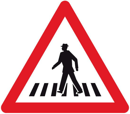 Signal 1.22 Gefahrensignal 1-22 Fussgaengerstreifen (CH).png